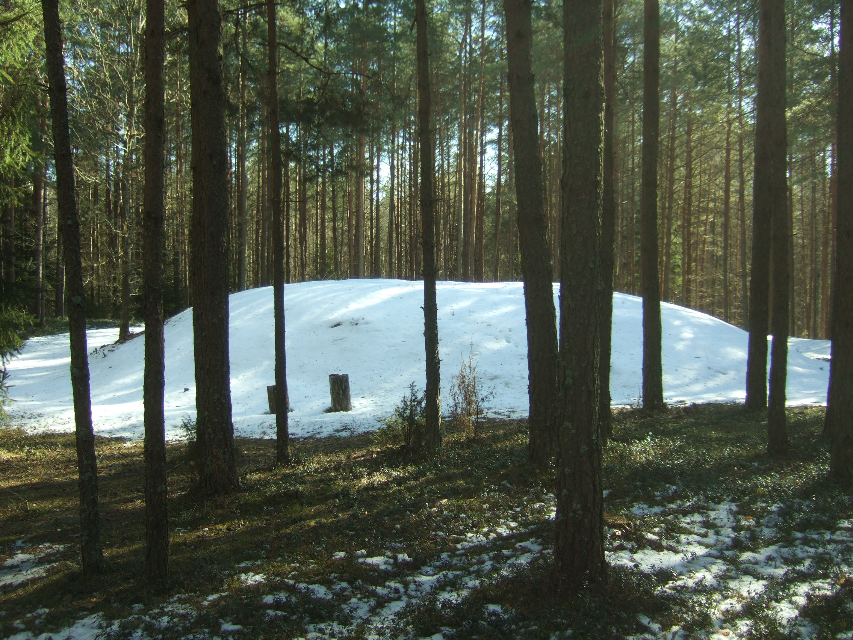 Didžiausias Poškonių pilkapyno pilkapis